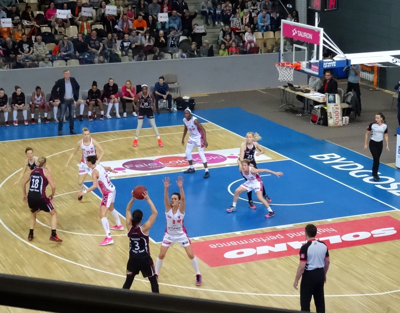 Mecz Polskiej Ligi Koszykówki Kobiet (Basket Liga Kobiet) Artego Bydgoszcz - Energa Toruń, 7 listopada 2015 roku w Artego-Arenie w Bydgoszczy